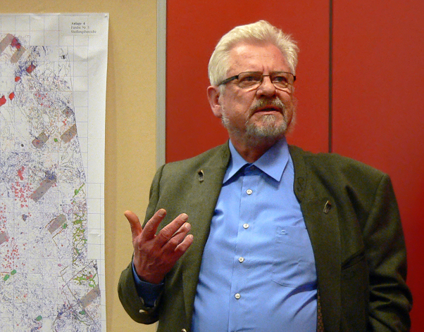 Der Archäologe Wilhelm Gebers bei einem Vortrag zu den Ausgrabungen am Kronsberg bei Rullstorf vor einem Ausgrabungsplan vom Kronsberg